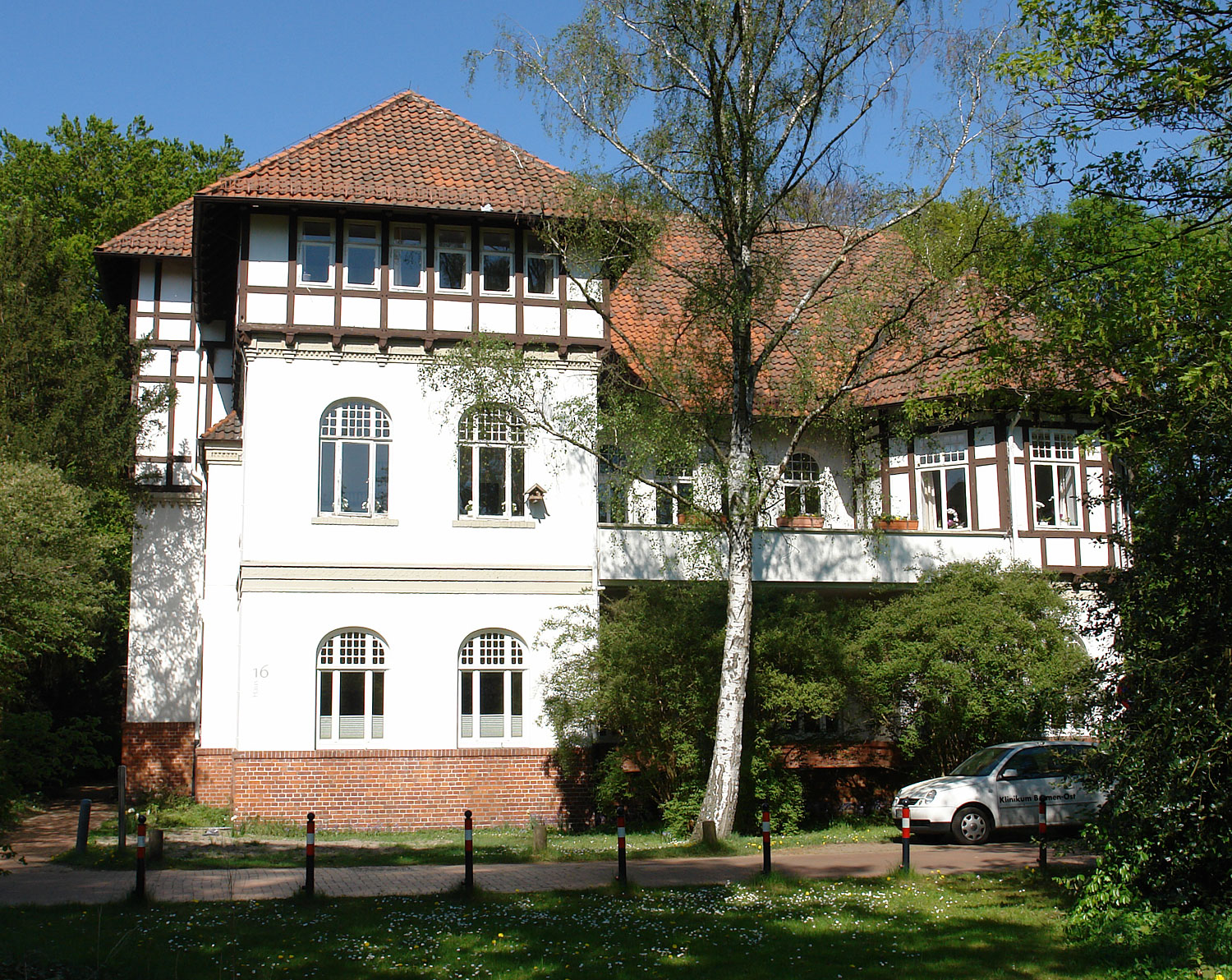 Klinikum Bremen-Ost, Haus 16. Ehemals St. Jürgen Asyl, Haus VII. Herstellung 1900–1904 Funktion: Pensionshaus für Männer Das abgebildete Objekt ist ein geschütztes Kulturdenkmal in der Freien Hansestadt Bremen, mit der Nr. 1660 beim Landesamt für Denkmalpflege registriert.